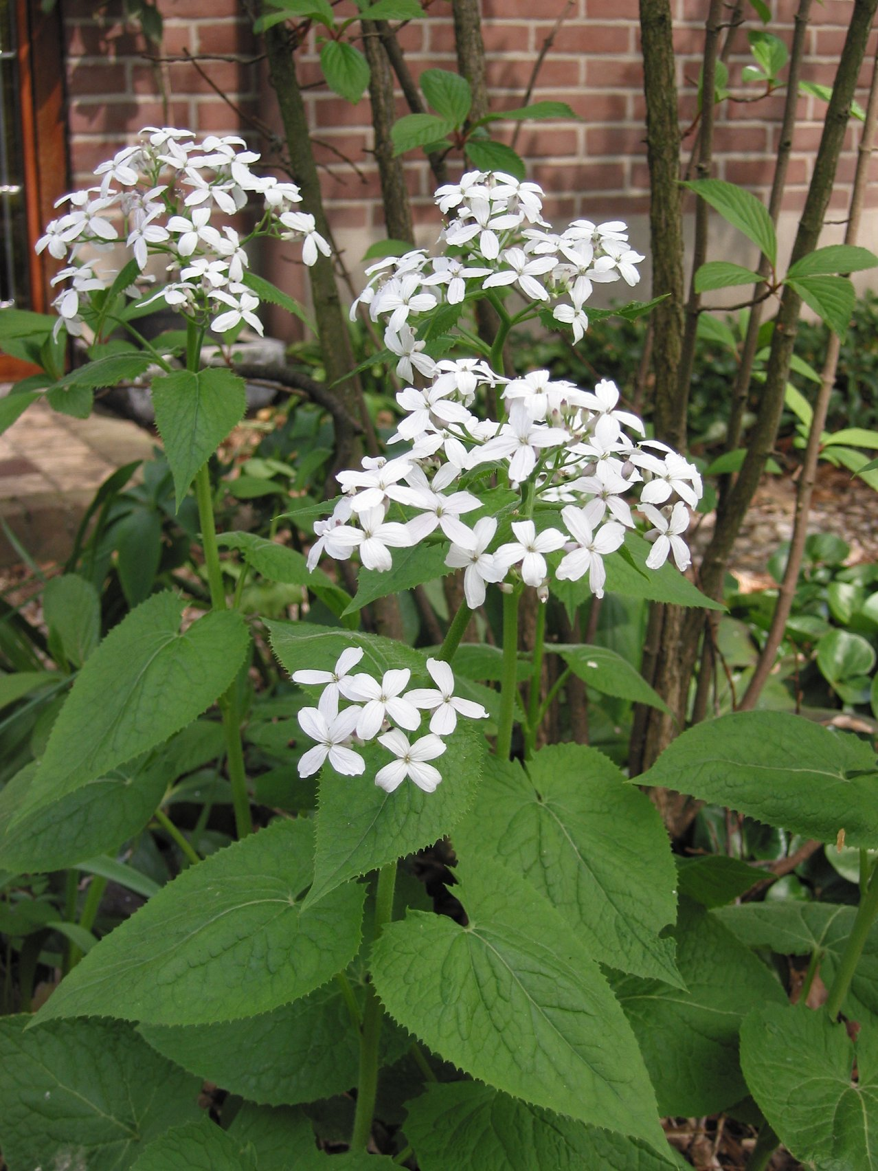 (nl: Vaste Judaspenning plant) Lunaria rediviva